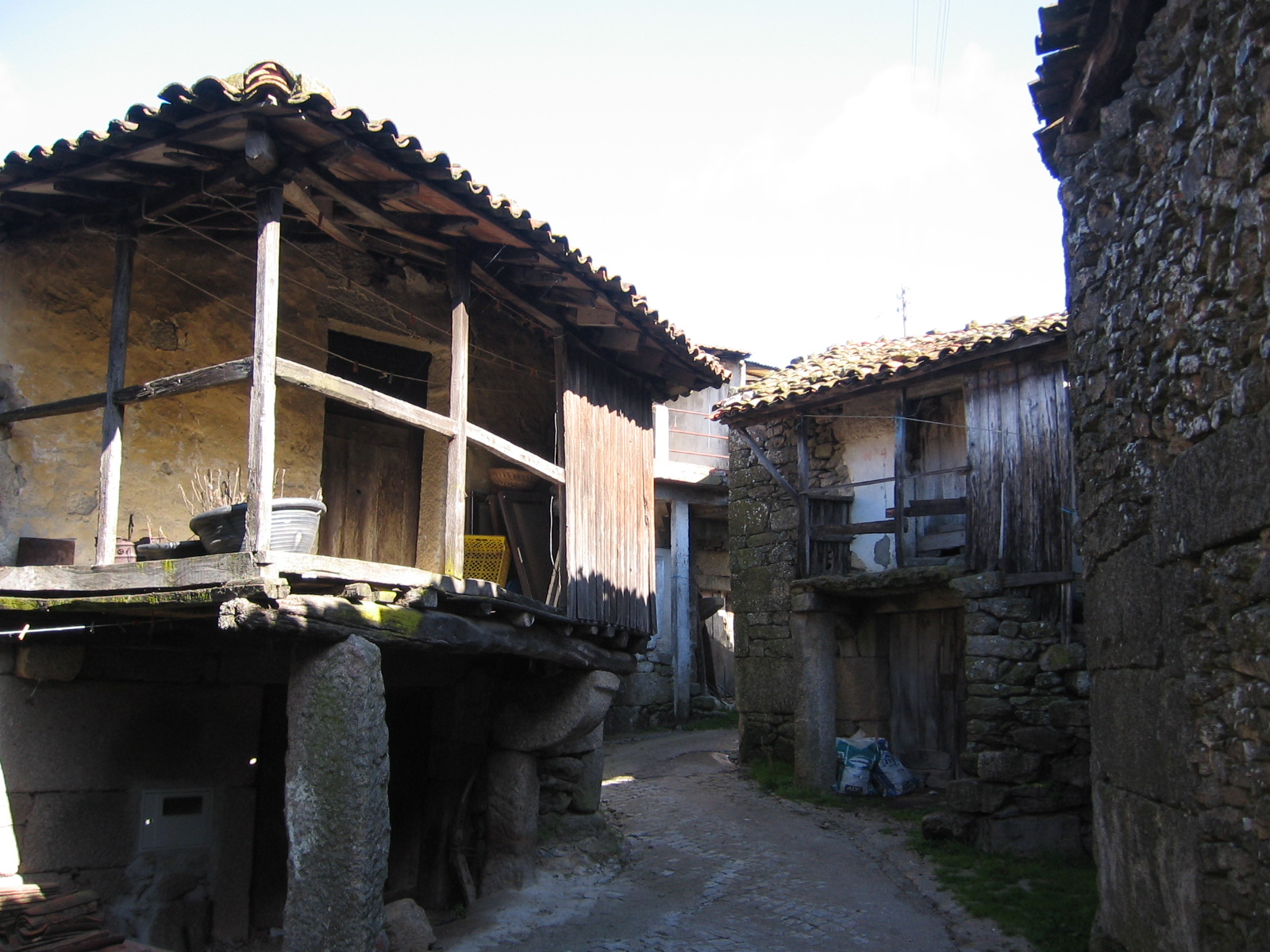 Rua da Alfândega, Soutelinho da Raia, Chaves, Porttugal.